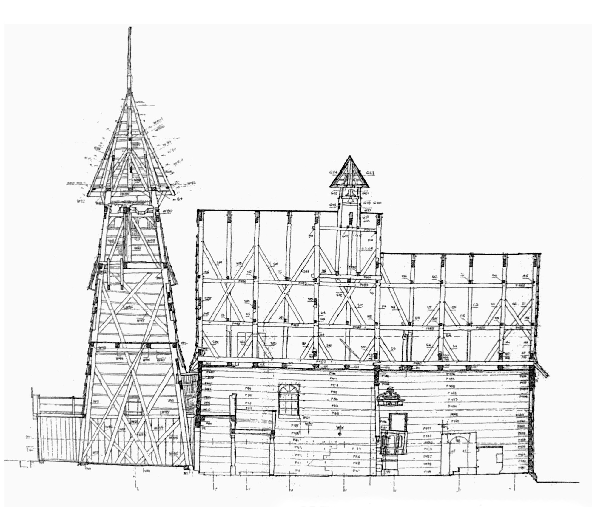 Przekrój drewnianego koscioła pw. Trójcy Przenajświętszej sporządzony przed rozbiórką i przeniesieniem do Palowic w 1981 roku.